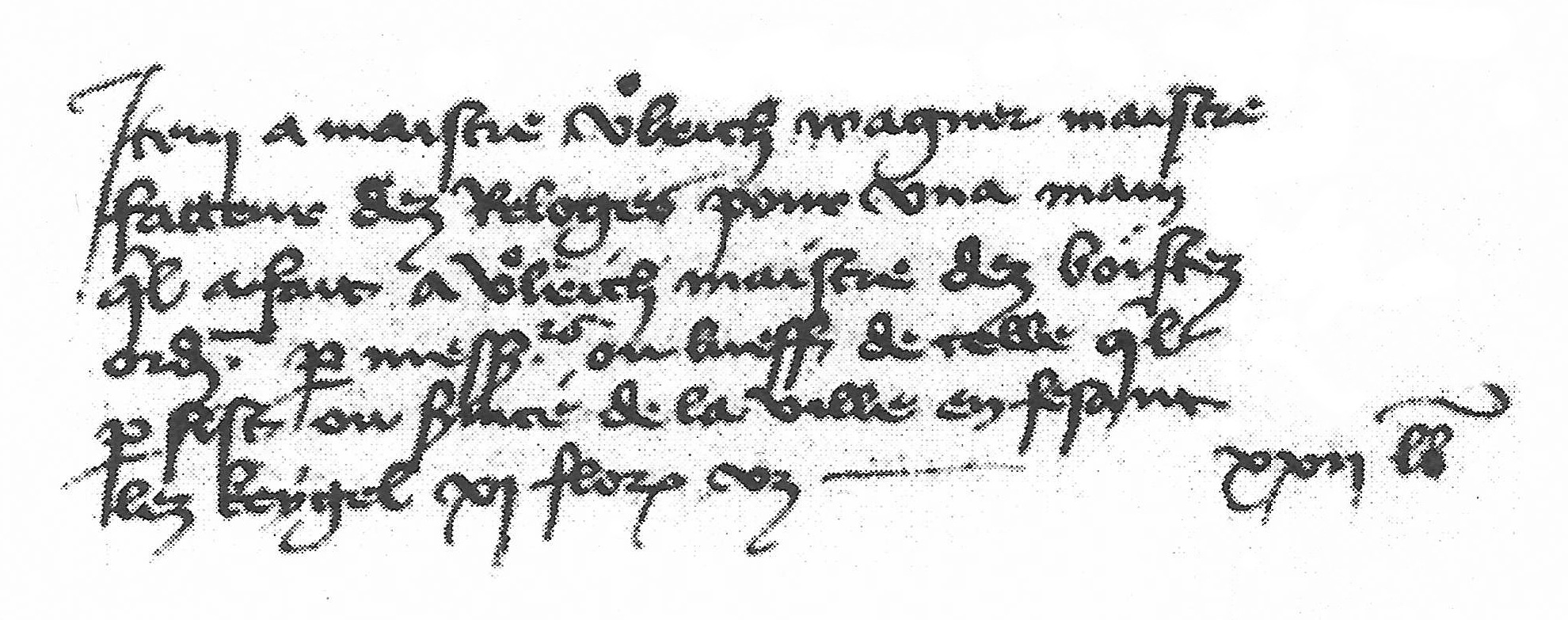 Rechnung der Stadt Freiburg im Üechtland für eine von Ulrich Wagner im Jahr 1476 angefertige Eiserne Hand. Staatsarchiv Freiburg, Seckelmeisterrechnung 148 b (2. Semester 1478), S. 64.